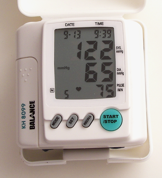 Digitales Blutdruckmessgerät / Digital Blood Pressure Monitor